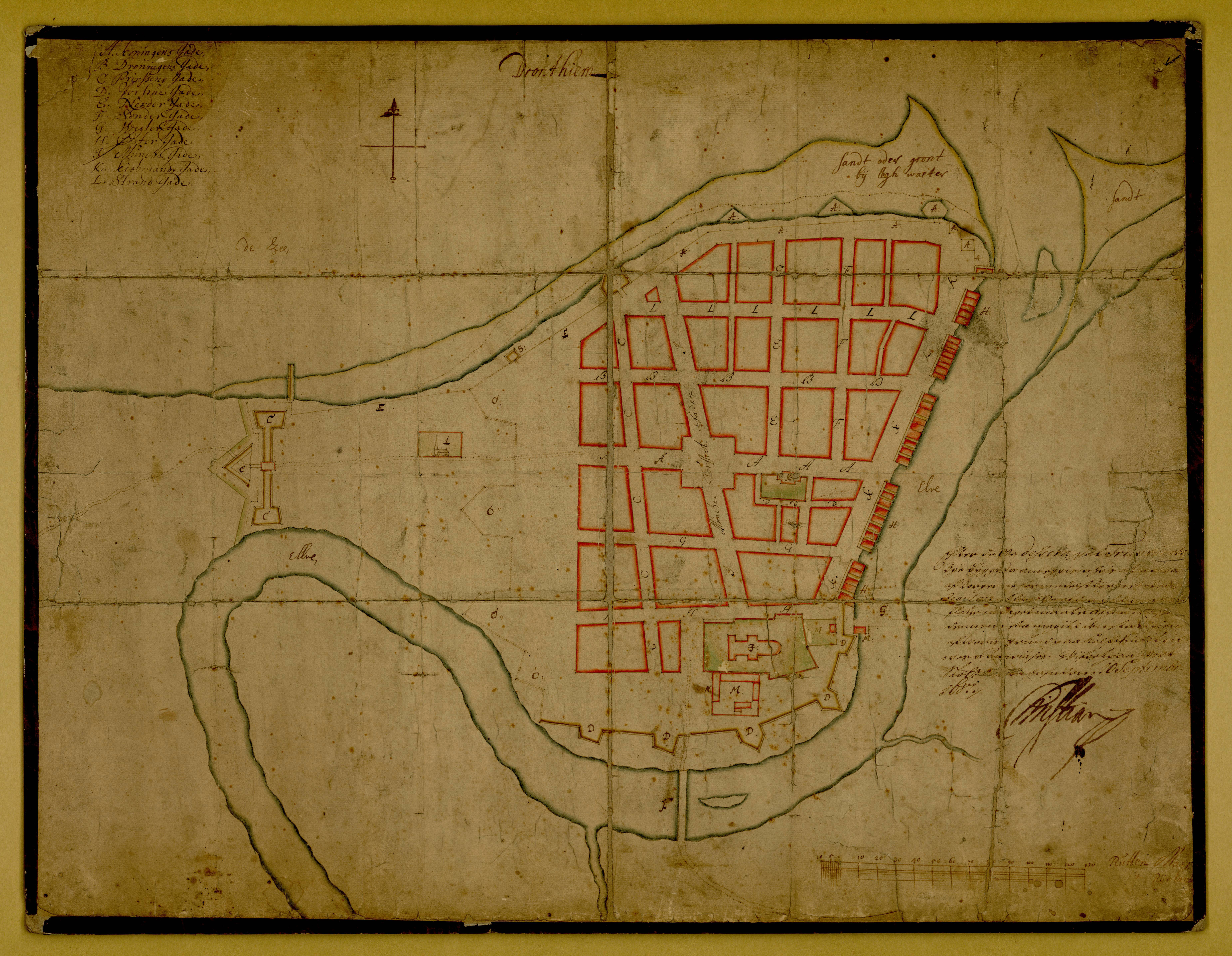 Johan Caspar de Cicignons plan for Trondheim. Fra 1681